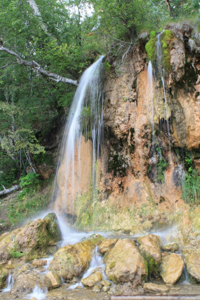 Плакун, Суксунский район This image is related to the protected area of Russia number 5910364